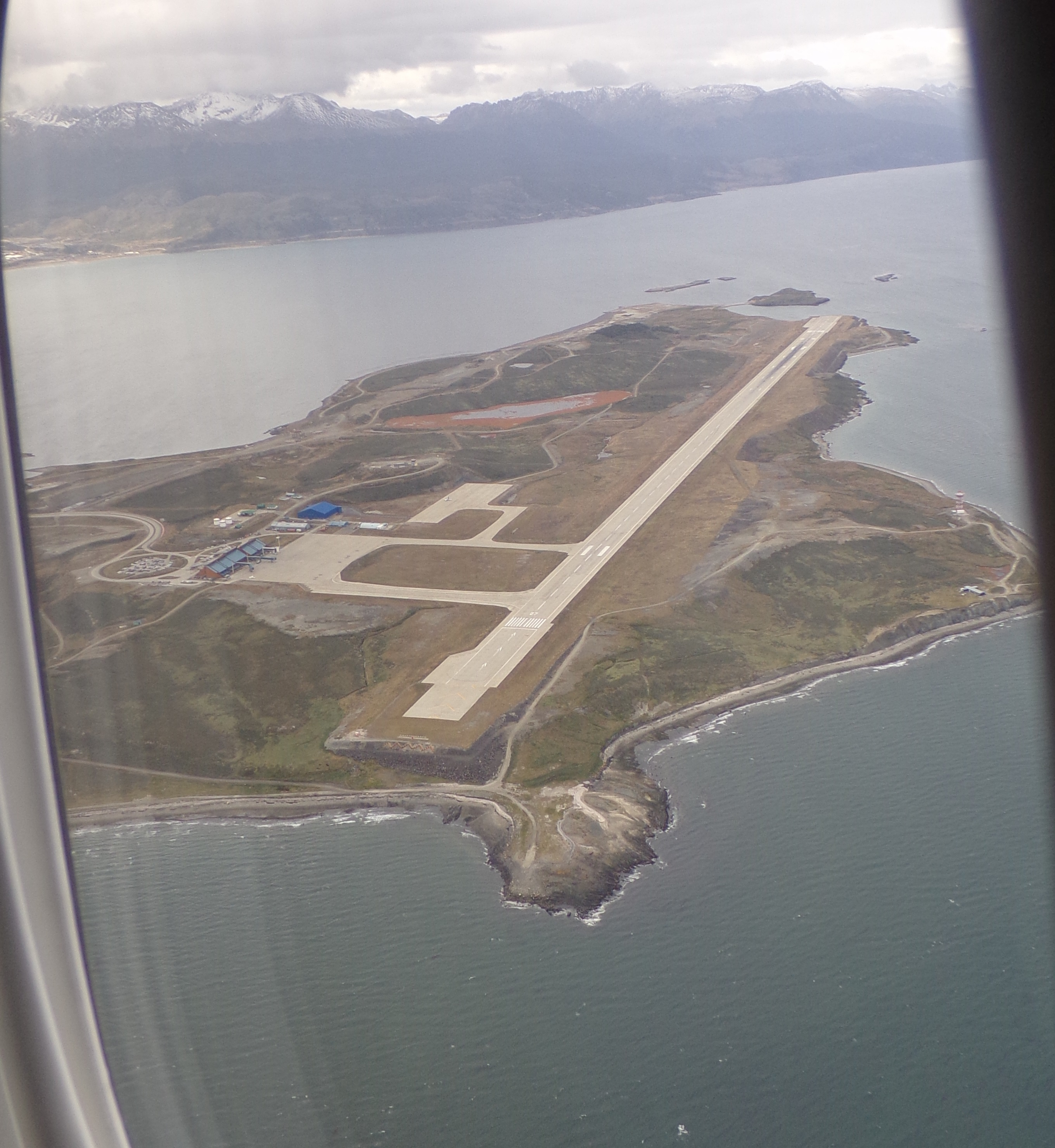 Aeropuerto Malvinas Argentinas Ushuaia - vista aérea